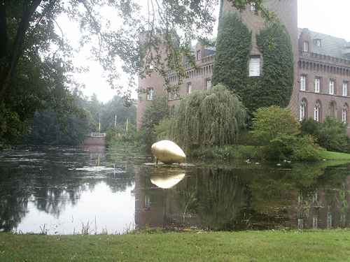 Slotgracht met sculptuur The Spinning Oracle from Delphi van James Lee Byars. James Lee Byars: Spinning Oracle, beeldenpark Museum Slot Moyland, Bedburg-Hau. Museum Schloss Moyland.